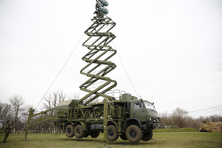 Антенный модуль Р-431АМ МИК-МКС комплекса П-260Т «Редут-2УС» 175-й бригады управления на командно-штабном учении (КШУ) по связи Южного военного округа.